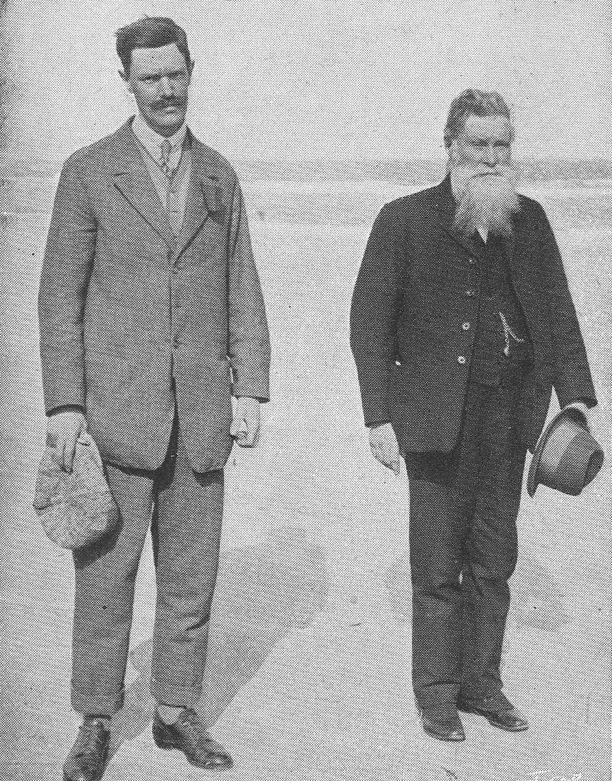 John Boyd Dunlop (r.), Sohn J. Dunlop, S. 132, 1909